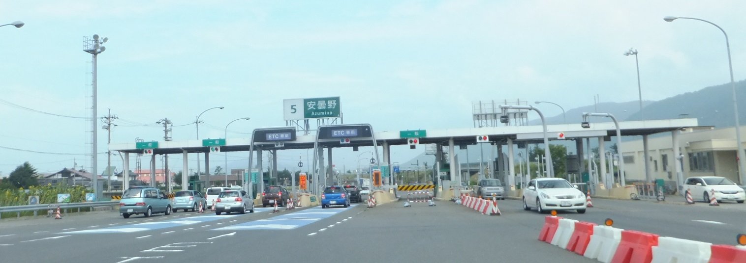 安曇野インターチェンジ